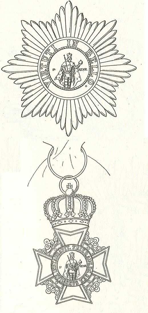 Tekening van Gritzner